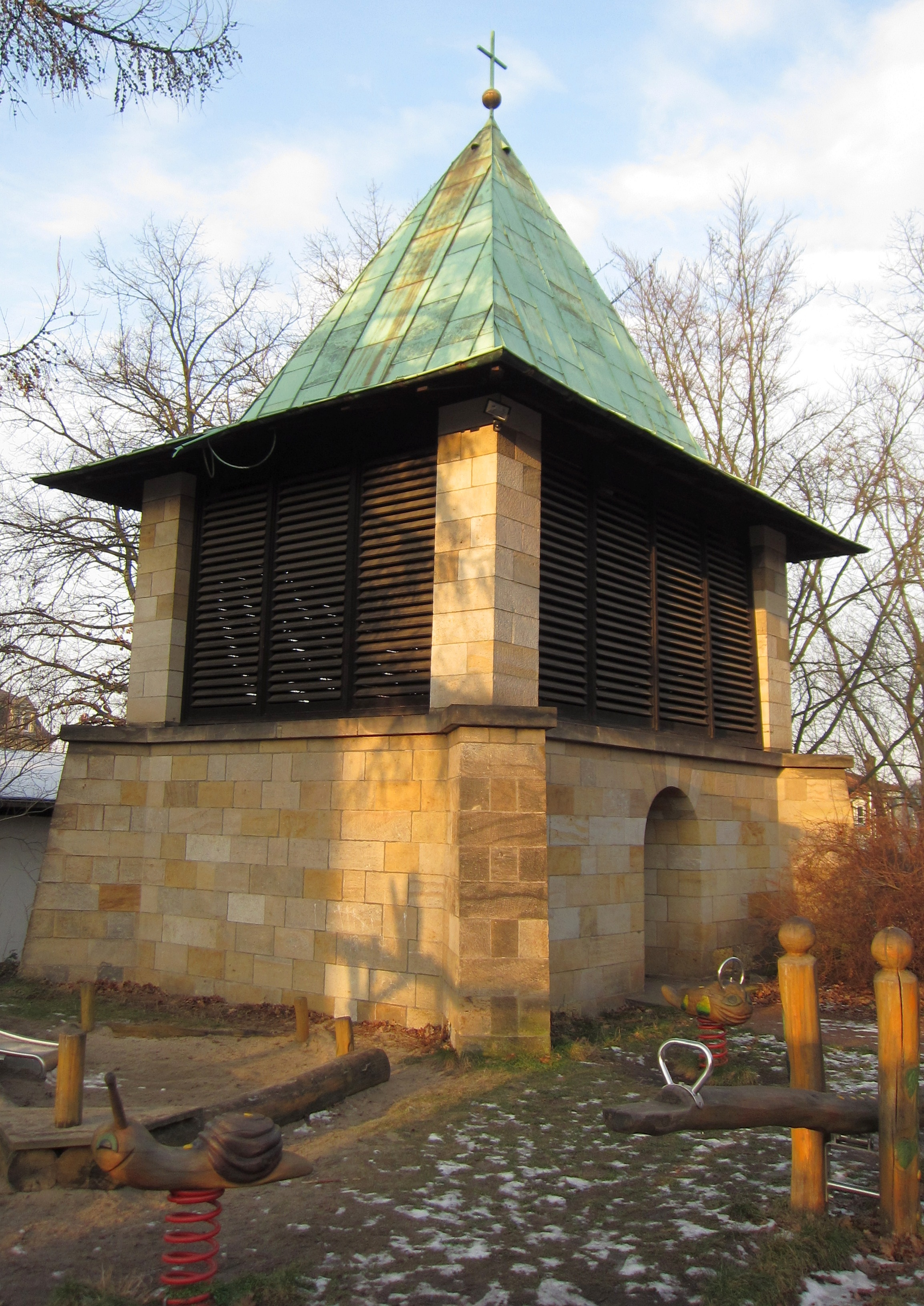 Weinbergskirche Dresden-Trachenberge, Separater Glockenstuhl